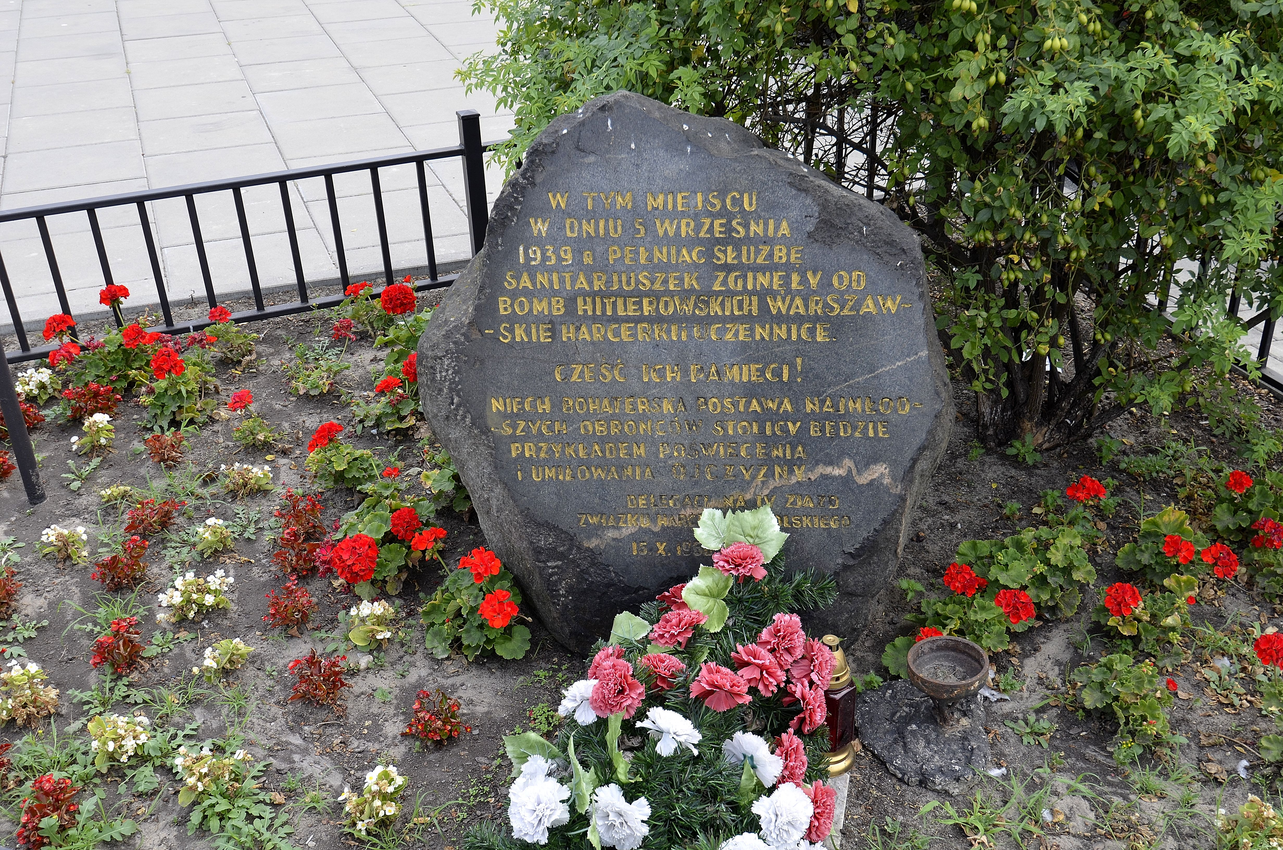 Kamień upamiętniający sanitariuszki, które zginęły w czasie obrony Warszawy we wrześniu 1939, na ulicy Kijowskiej (vis-a-vis Dworca Wschodniego) w Warszawie